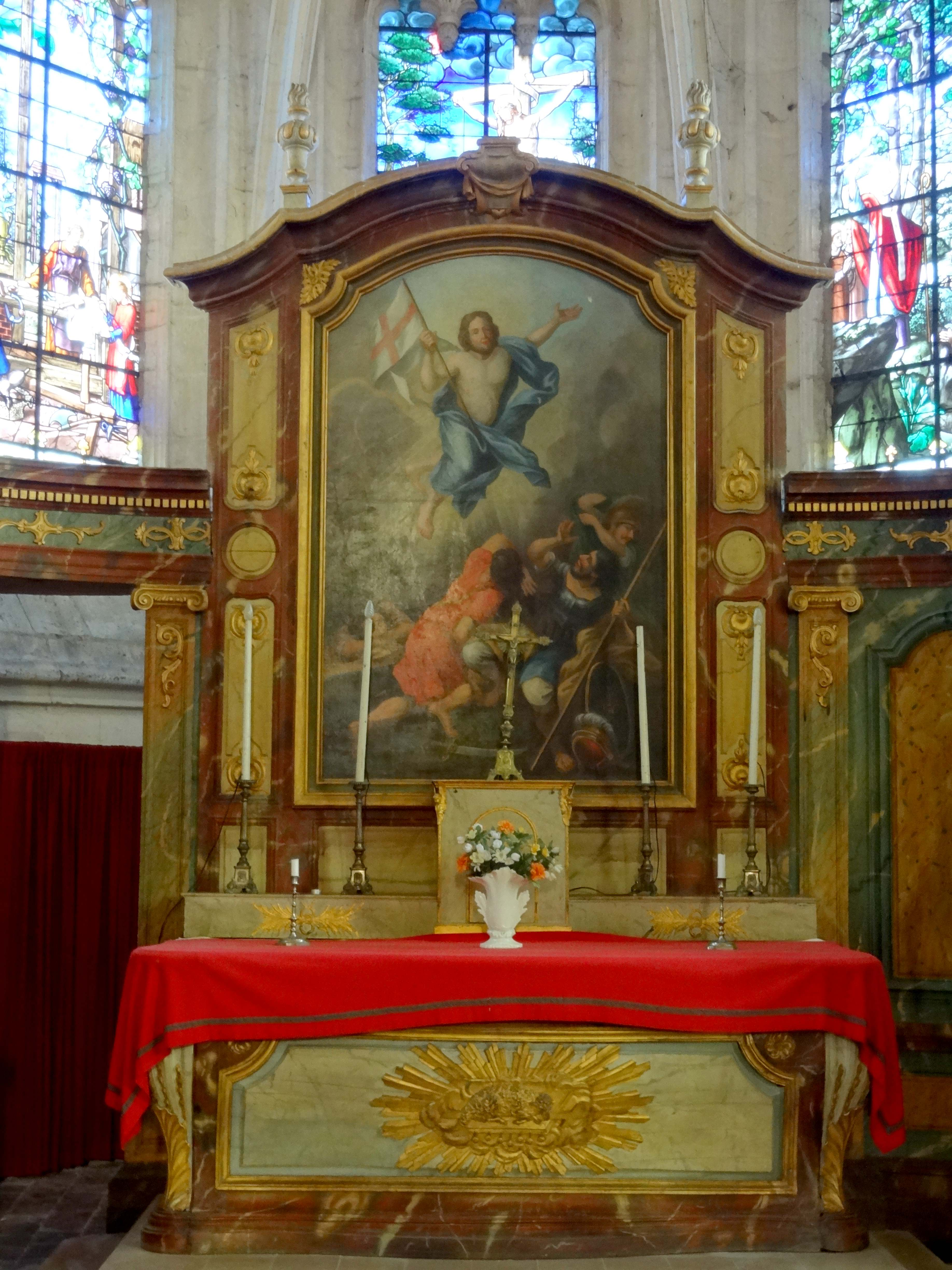 Mobilier de l'église - voir titre.